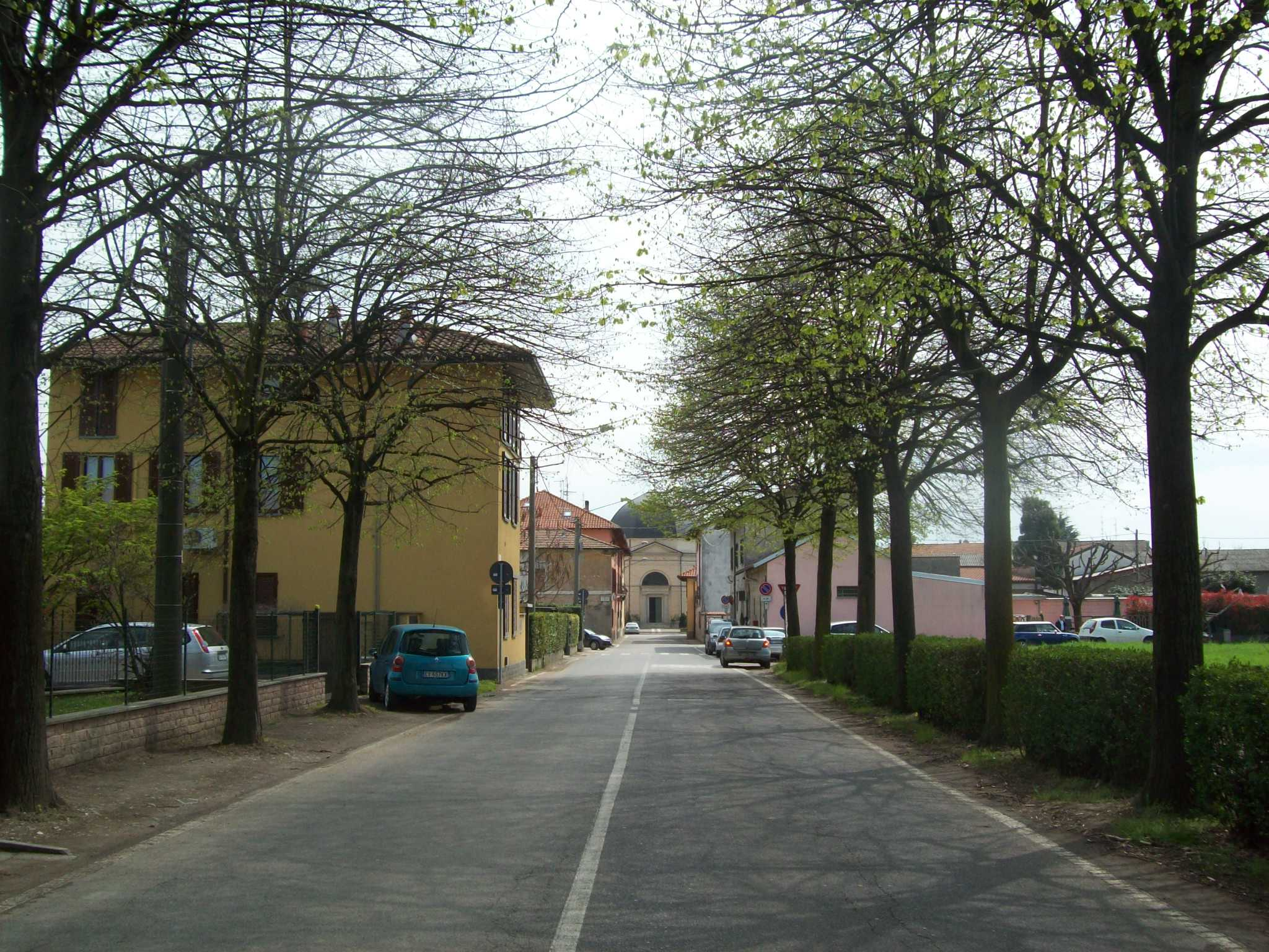 Panorama di Massina, frazione di Cislago